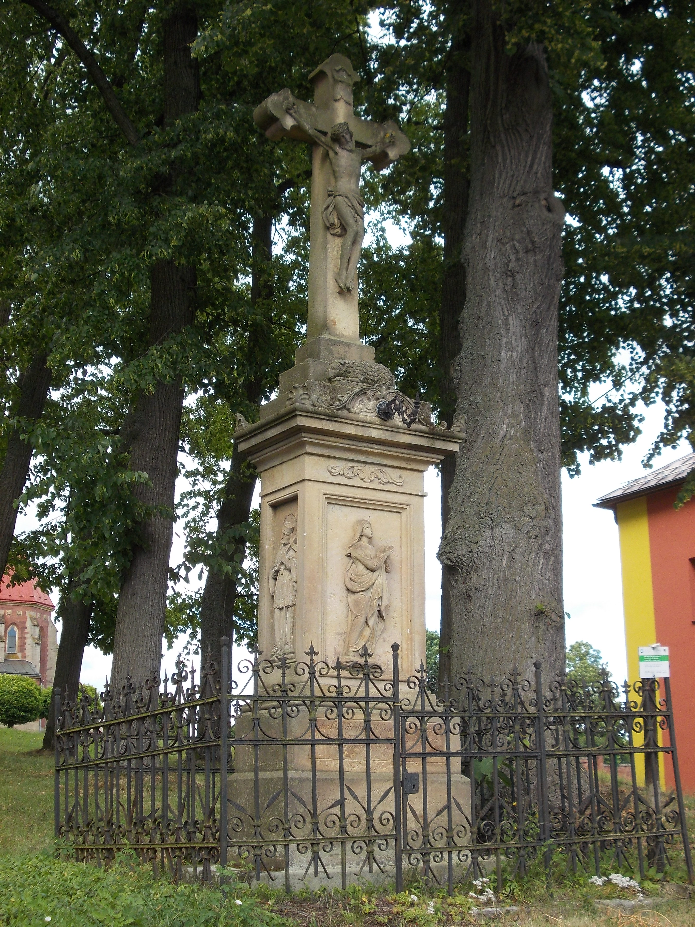 Zálesní Lhota - krucifix